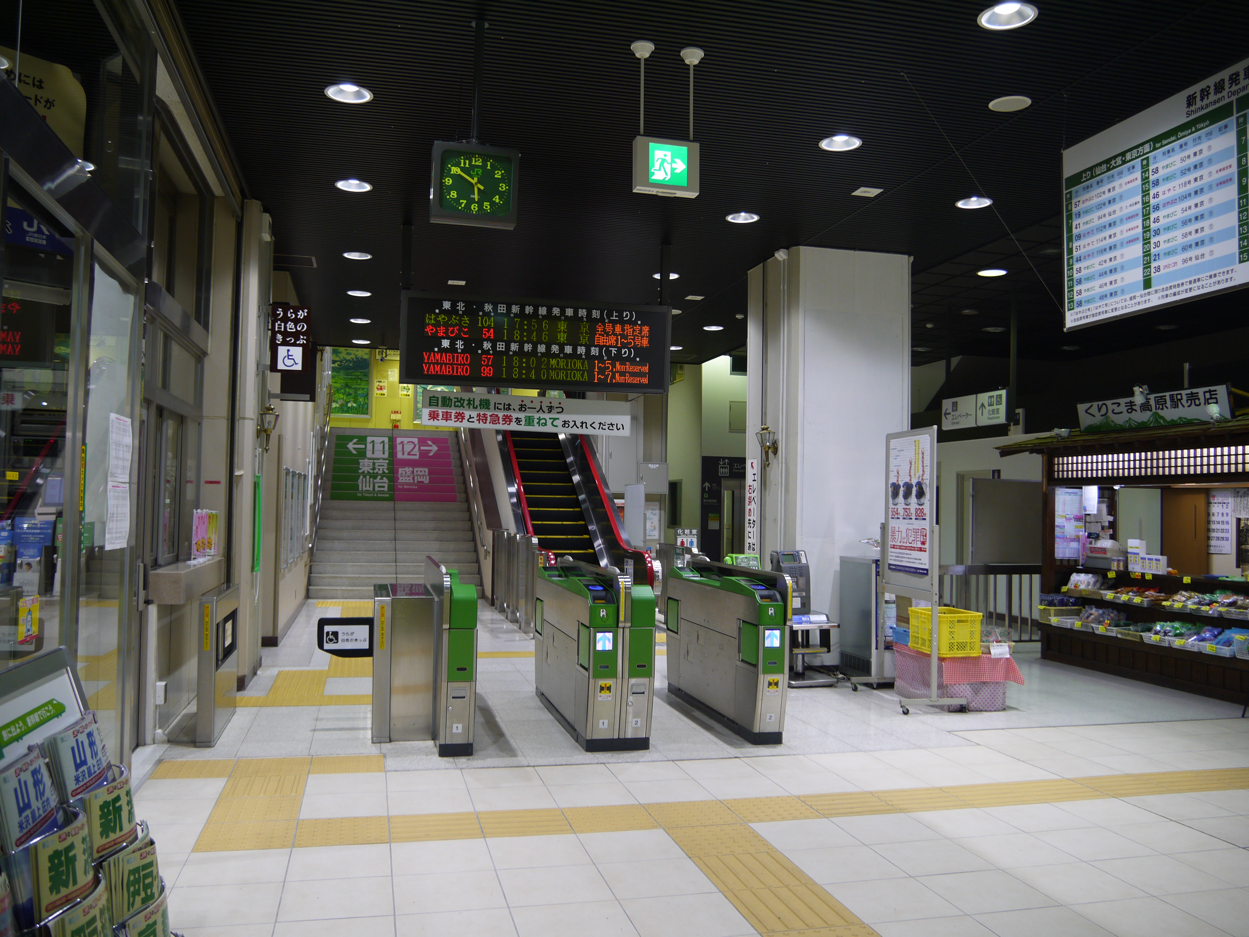 くりこま高原駅 改札口